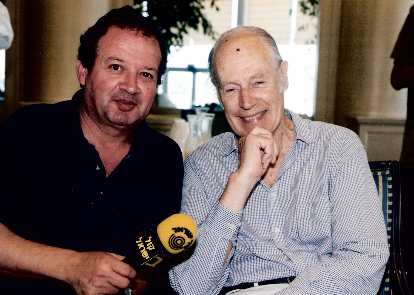 בני דודקביץ' עם ג'ורג' מרטין